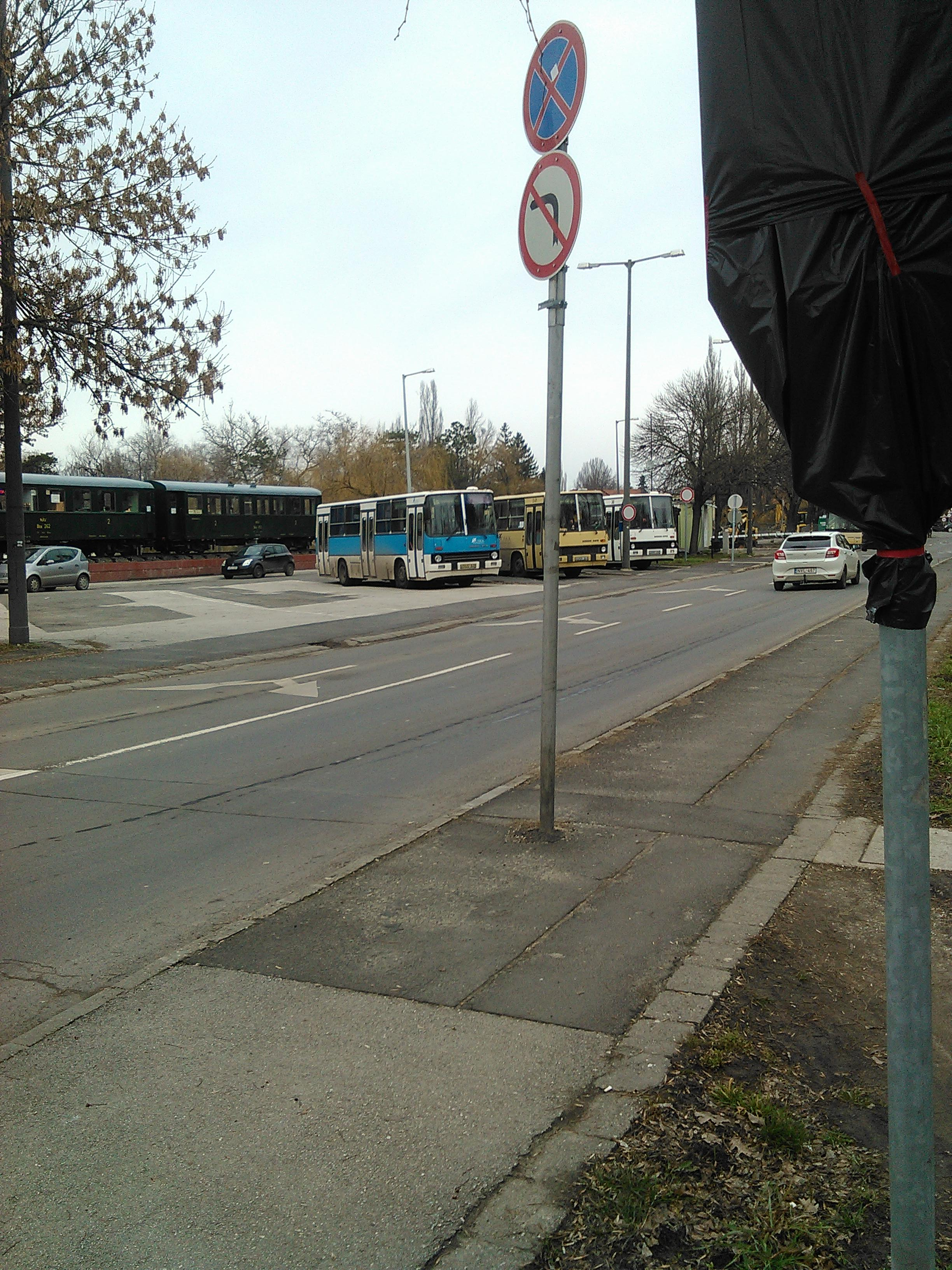 Ikarus buszok melyek szinte minden vonalon láthatóak a városban . A többi busz is a képen látható eltérő színekben közlekedik .